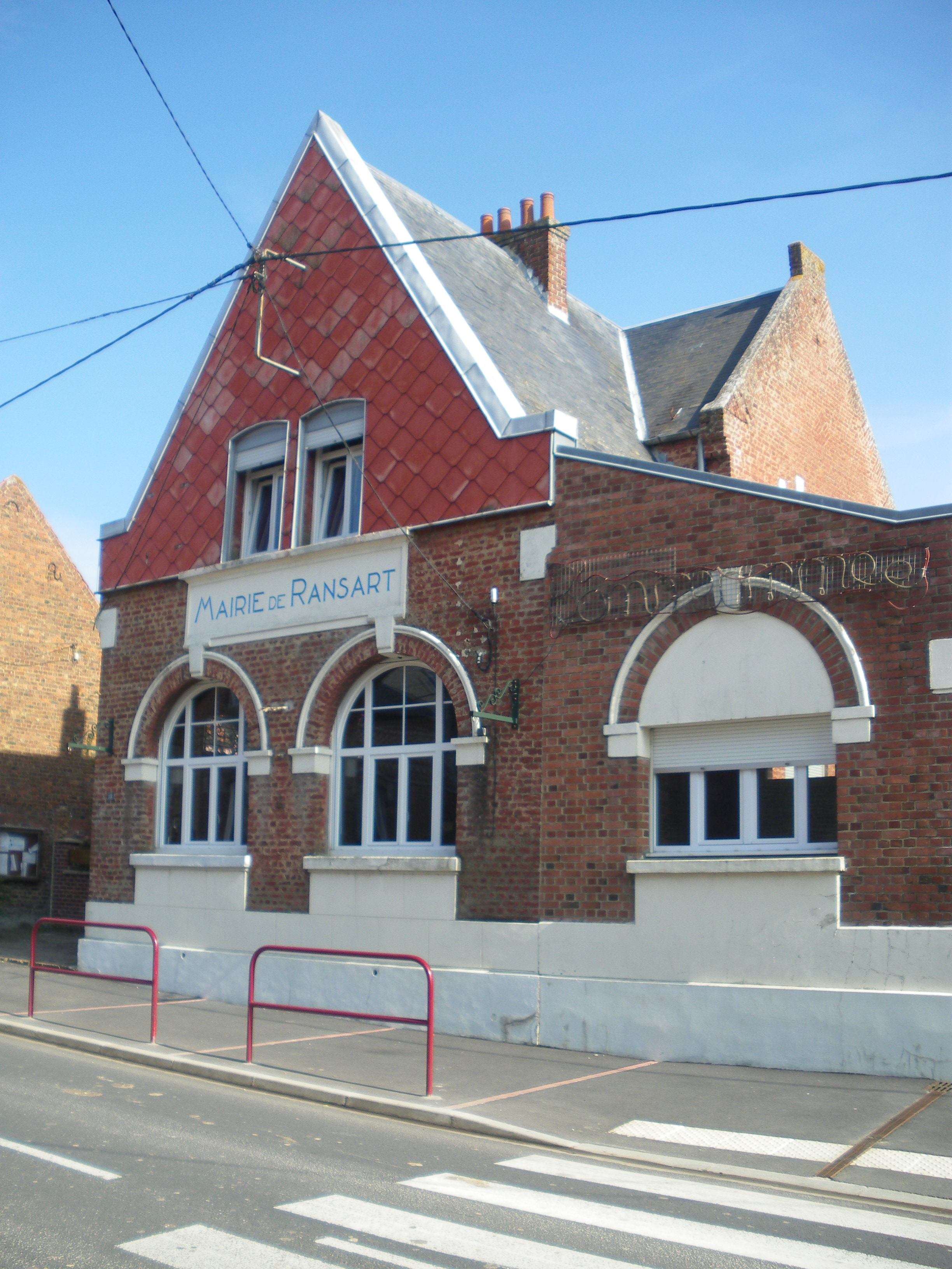 Vue de la mairie de Ransart.